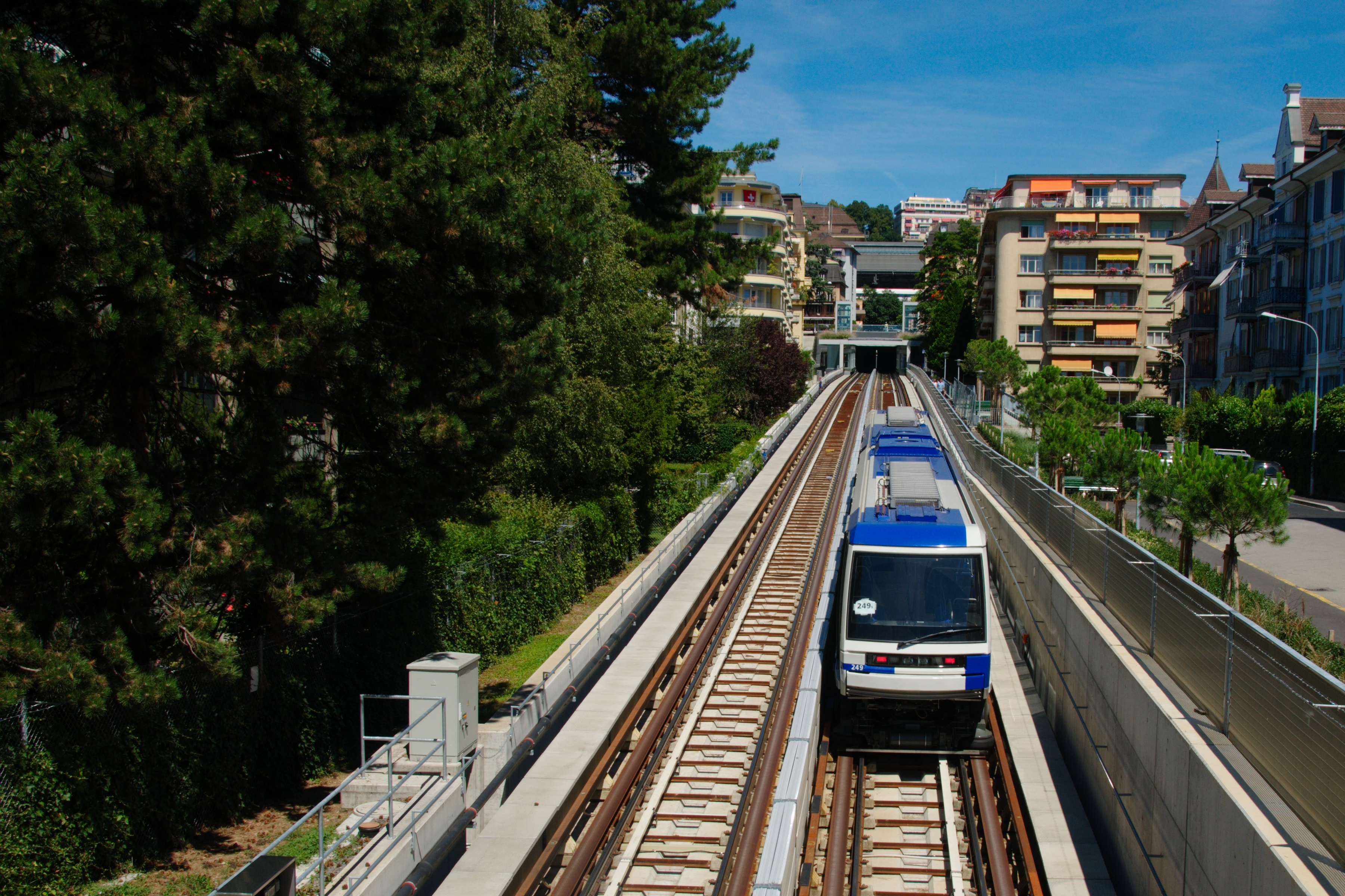 Metro de Lausanne M2